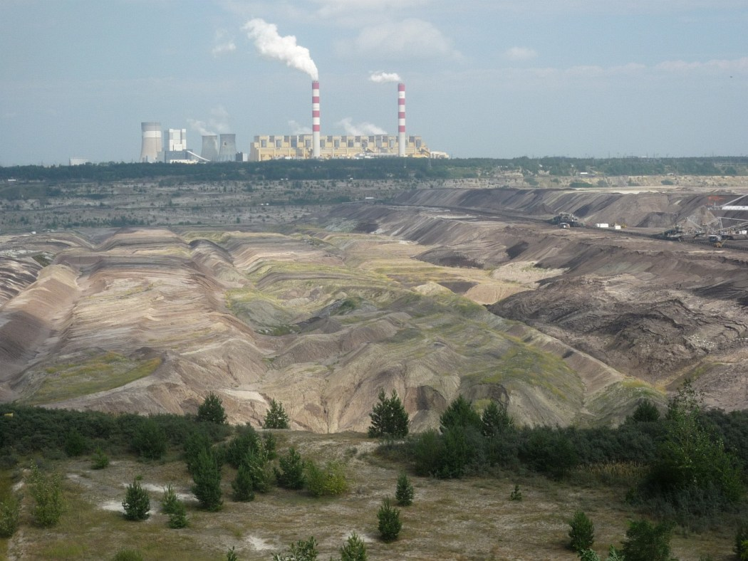 kopalnia i elektrownia "Bełchatów"